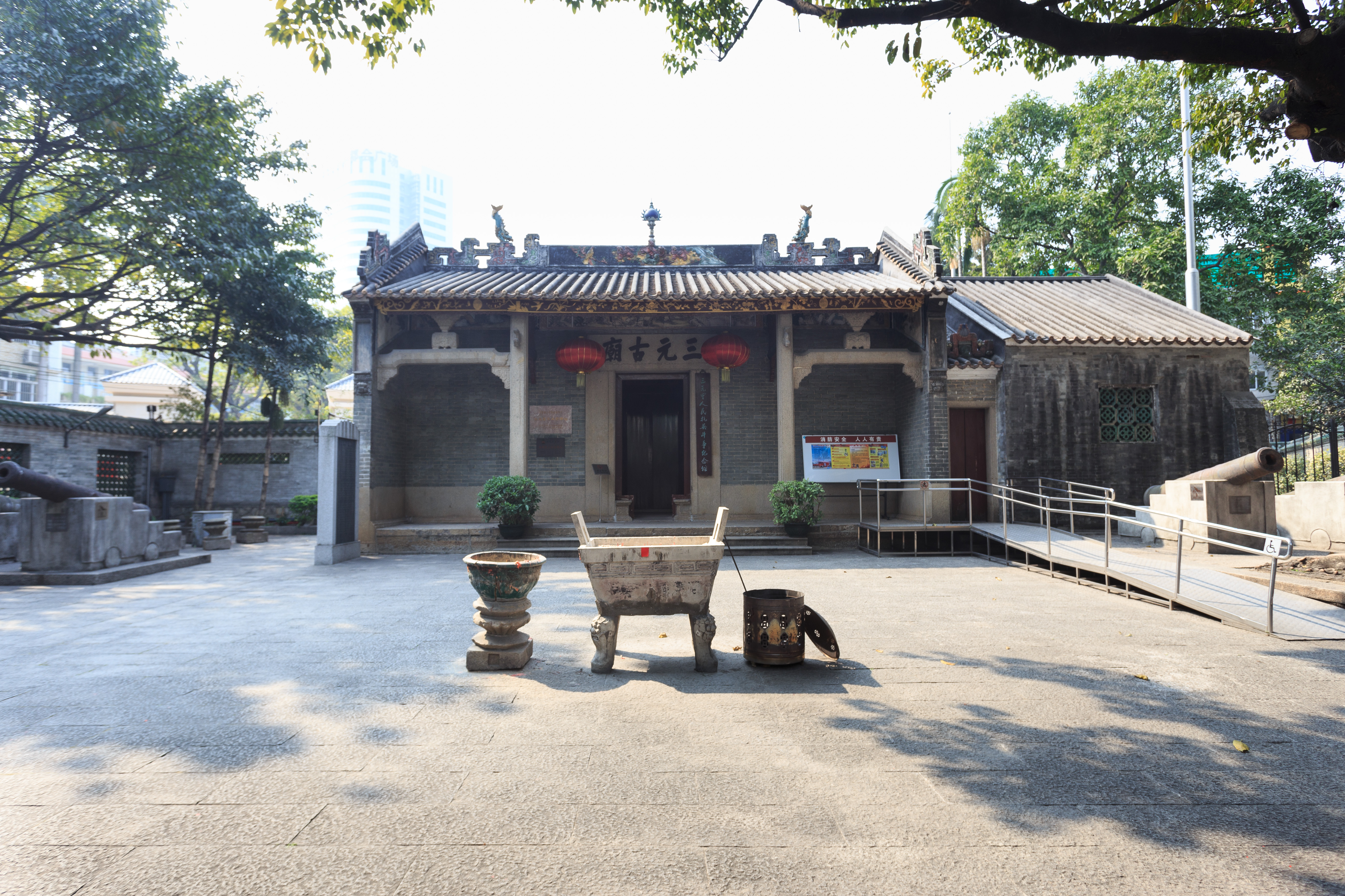 广州三元里平英团遗址（三元古庙）